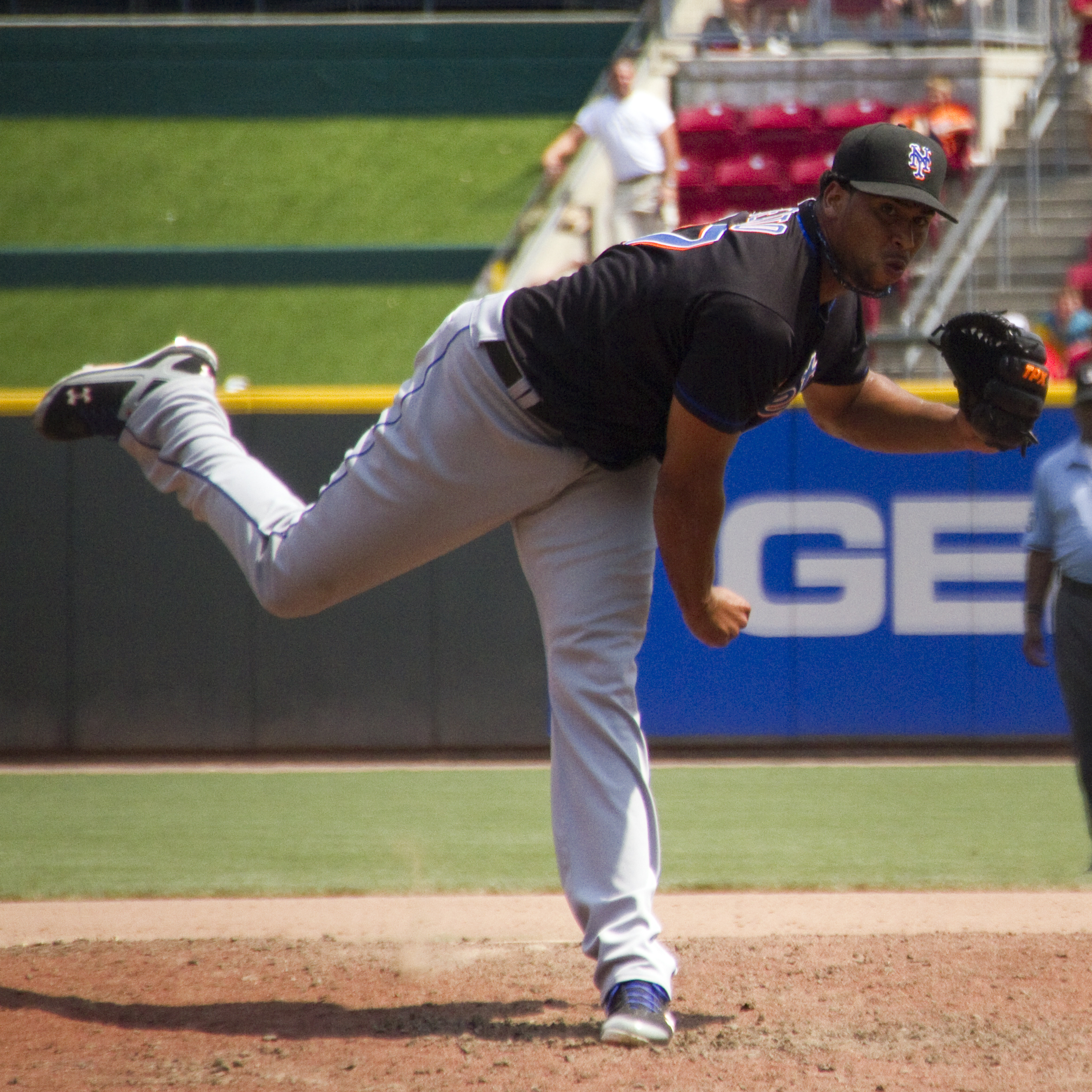 Pedro Beato